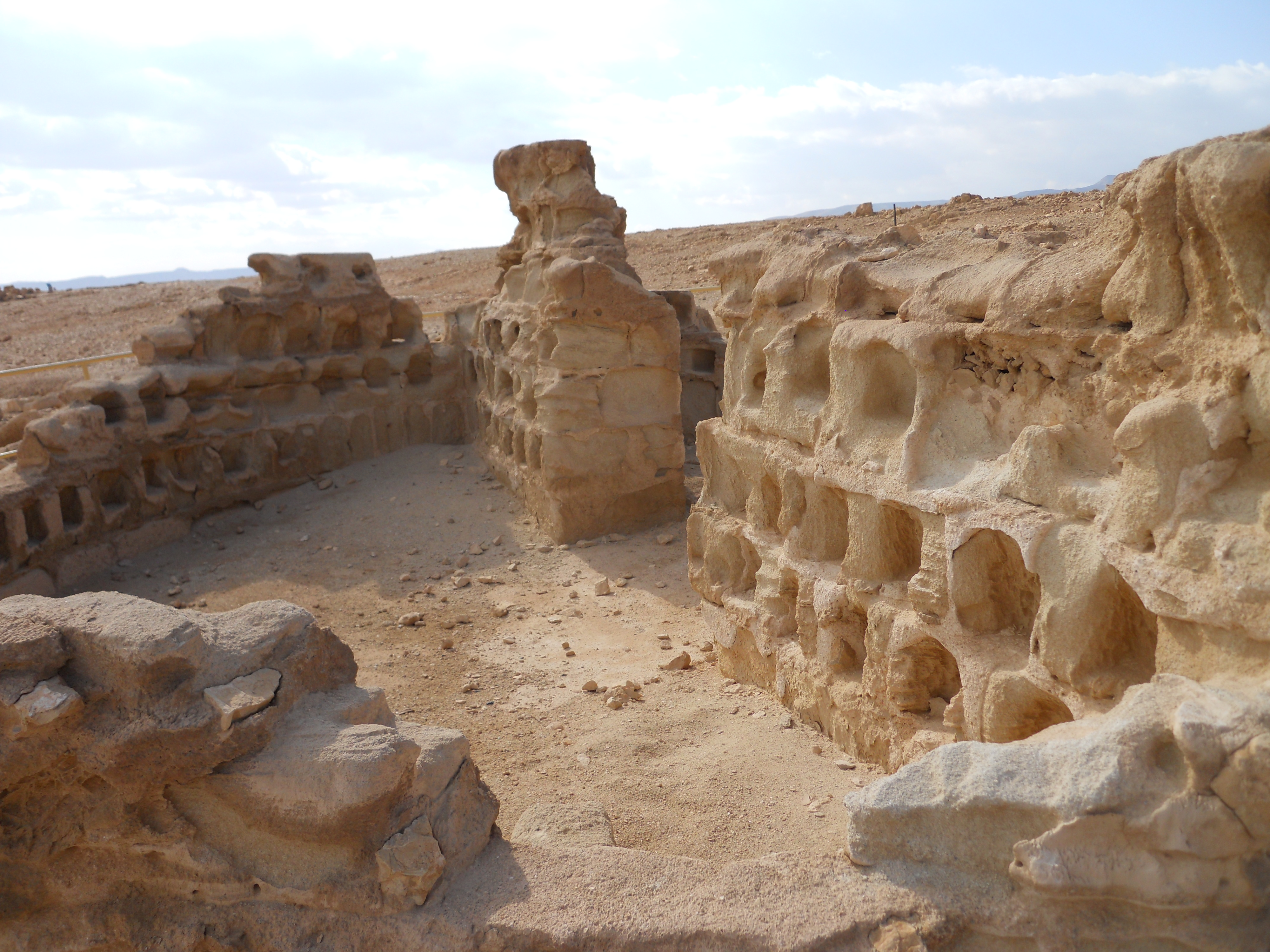 Masada